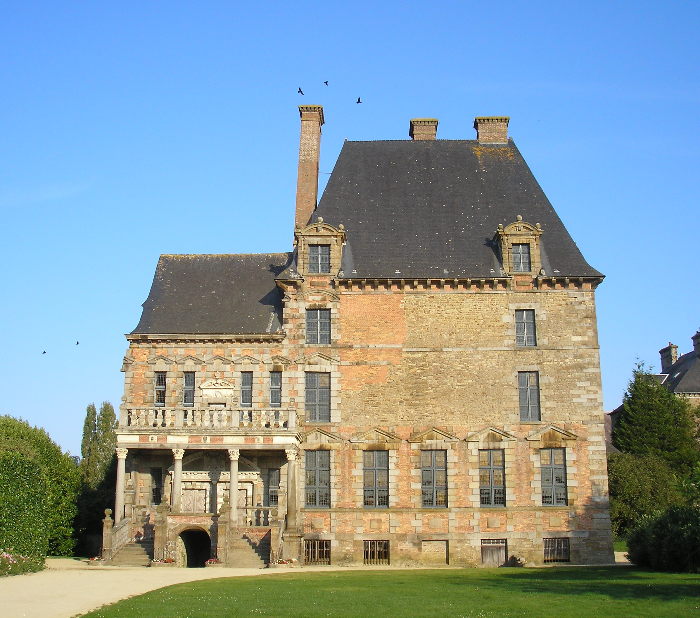 Ducey (Normandie, France). Le château des Montgommery.